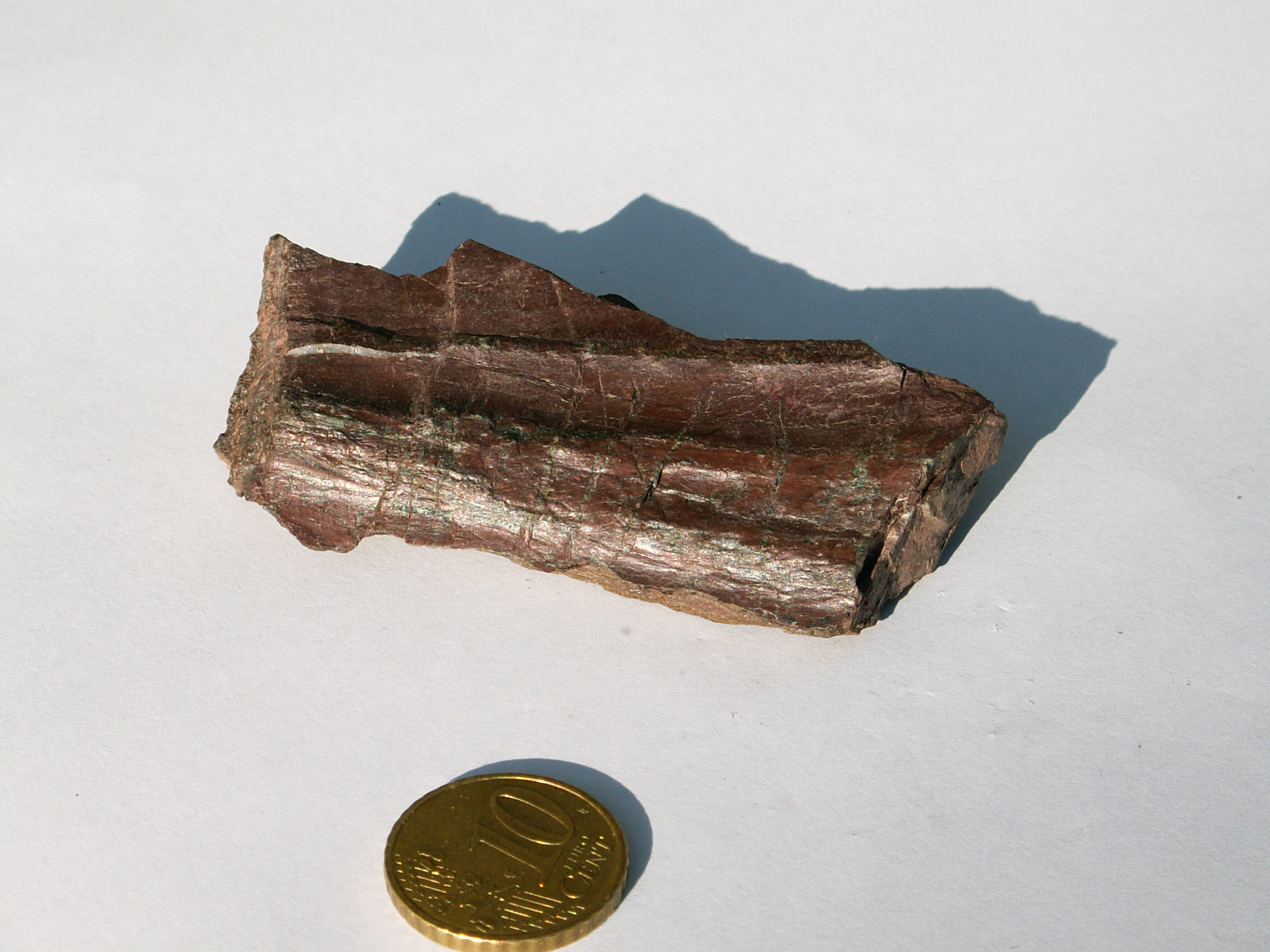 Radiolarite. Début du Jurassique supérieur ? Prélevée sur le Rocher de la Perdrix unité du Lago Nero, Chenaillet, Alpes